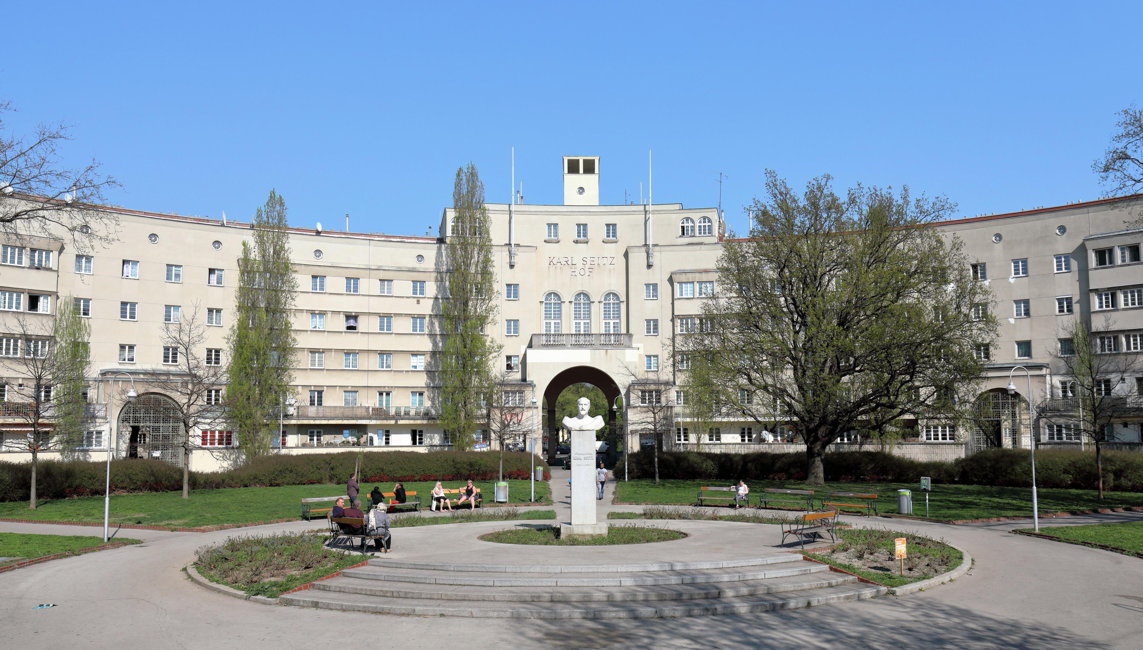 Zentrum des Karl-Seitz-Hofes im 21. Wiener Gemeindebezirk Floridsdorf.Die städtische Wohnhausanlage (Gemeindebau) mit rd. 1.150 Wohnungen wurde von 1926 bis 1933 nach Plänen von Hubert Gessner errichtet und am 16. Juni 1951 nach dem sozialdemokratischen Politiker Karl Seitz benannt. Im Vordergrund die platzartige Verkehrs- und Grünfläche beim Zentrum der Wohnhausanlage, die am 10. Februar 1998 nach Gemeinderatsausschuss für Kultur Karl-Seitz-Platz benannt wurde. Das Seitzdenkmal in der Mitte des Vorplatzes wurde 1951 aufgestellt, die Büste dazu schuf Gustinus Ambrosi.